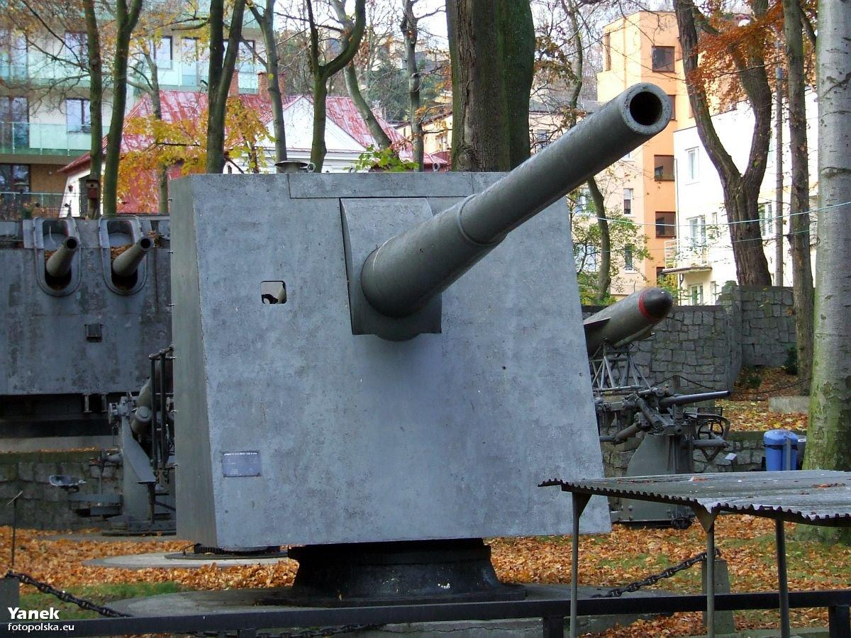 Armata wz 35 kal. 152,4 mm artylerii przybrzeżnej.